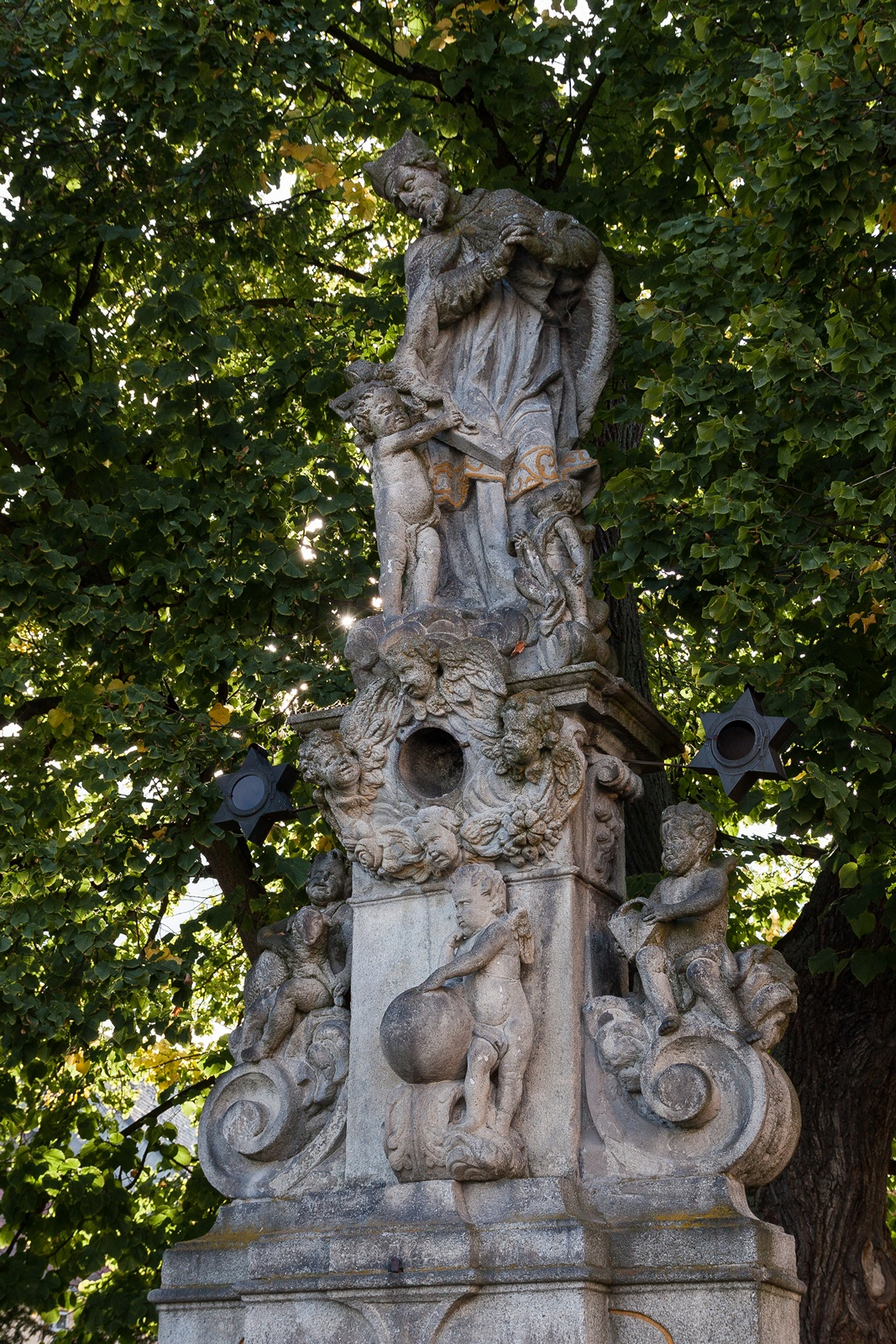 Socha sv. Jana Nepomuckého (Stráž), náměstí, Stráž